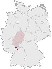 Lage des Landkreises Kreis Bergstraße in Deutschland